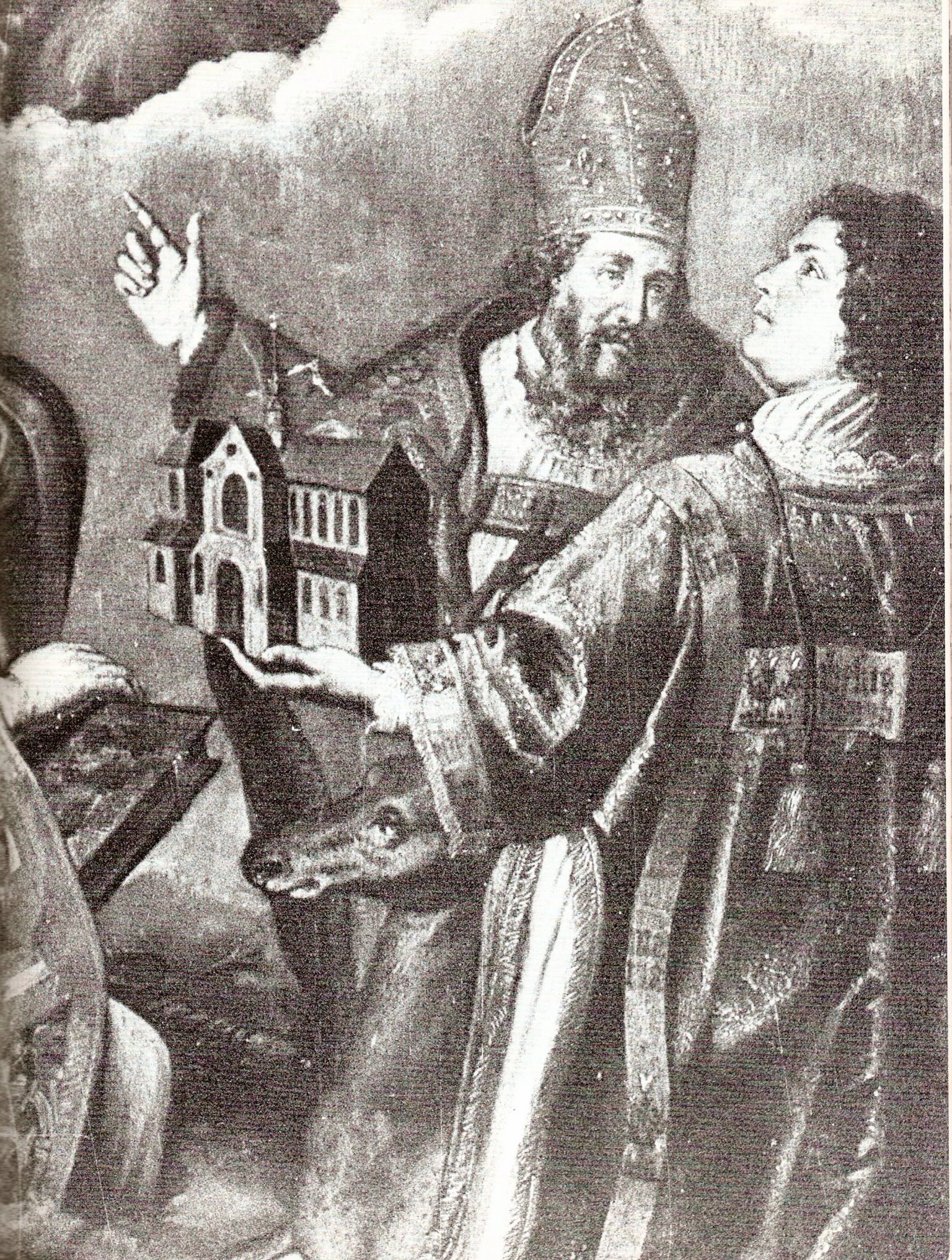 Bischof Baduard von Paderborn 815 Barockes Altarbild